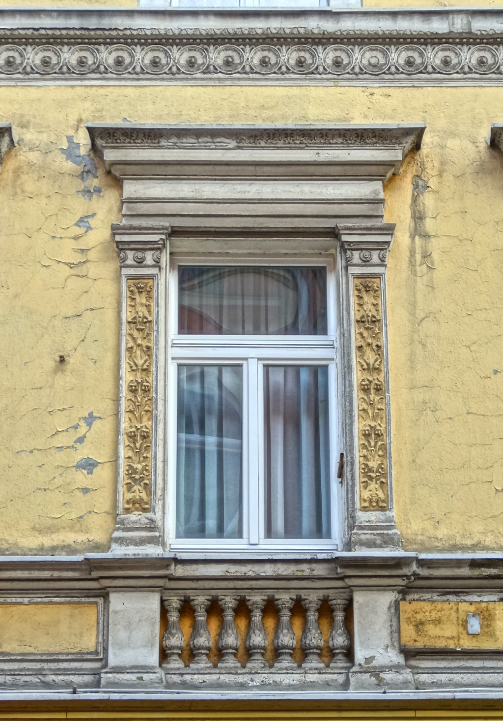 Hotel Ratuszowy (**) przy ul. Długiej 37 w Bydgoszczy